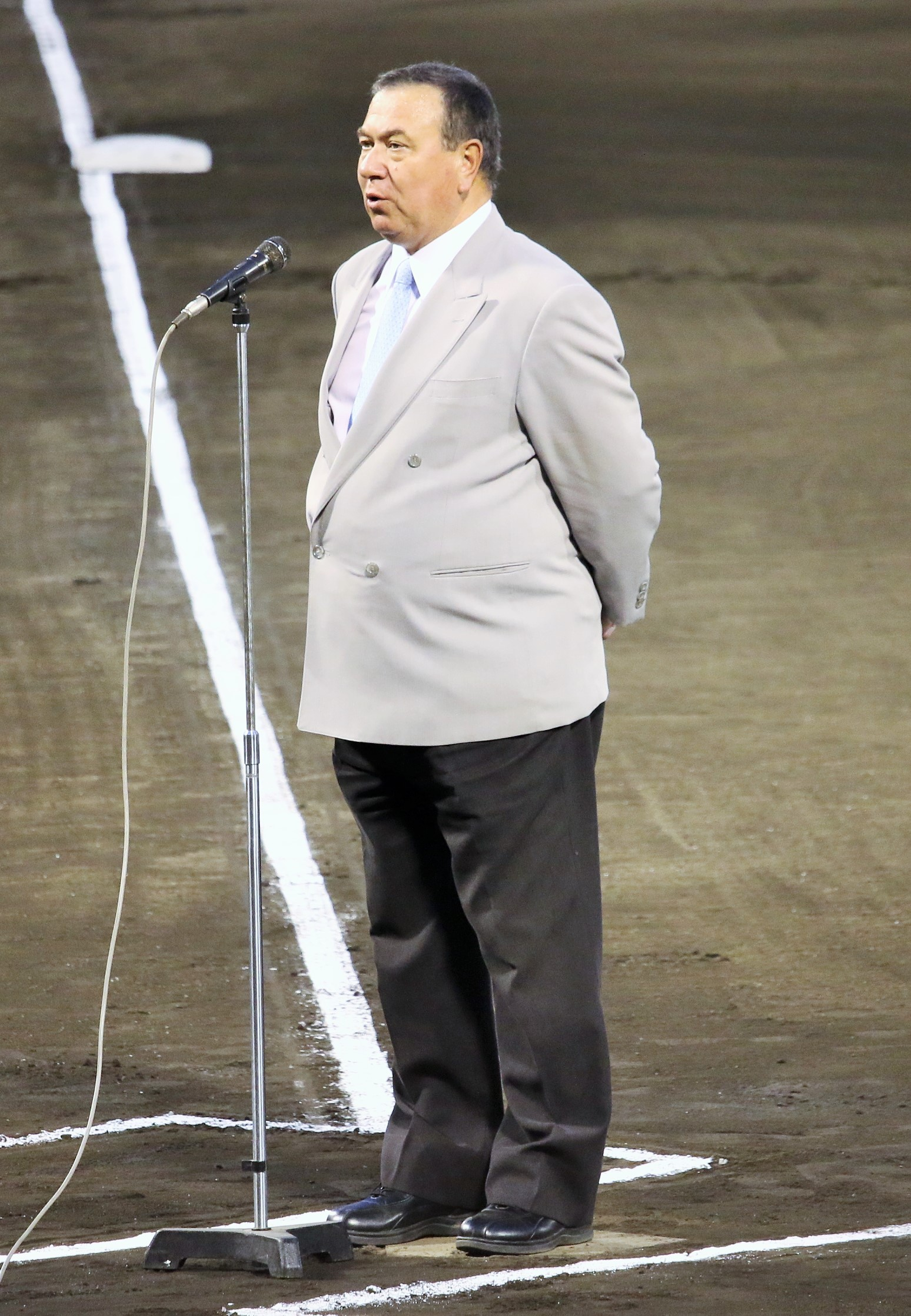 日本女子プロ野球機構スーパーバイザー太田幸司